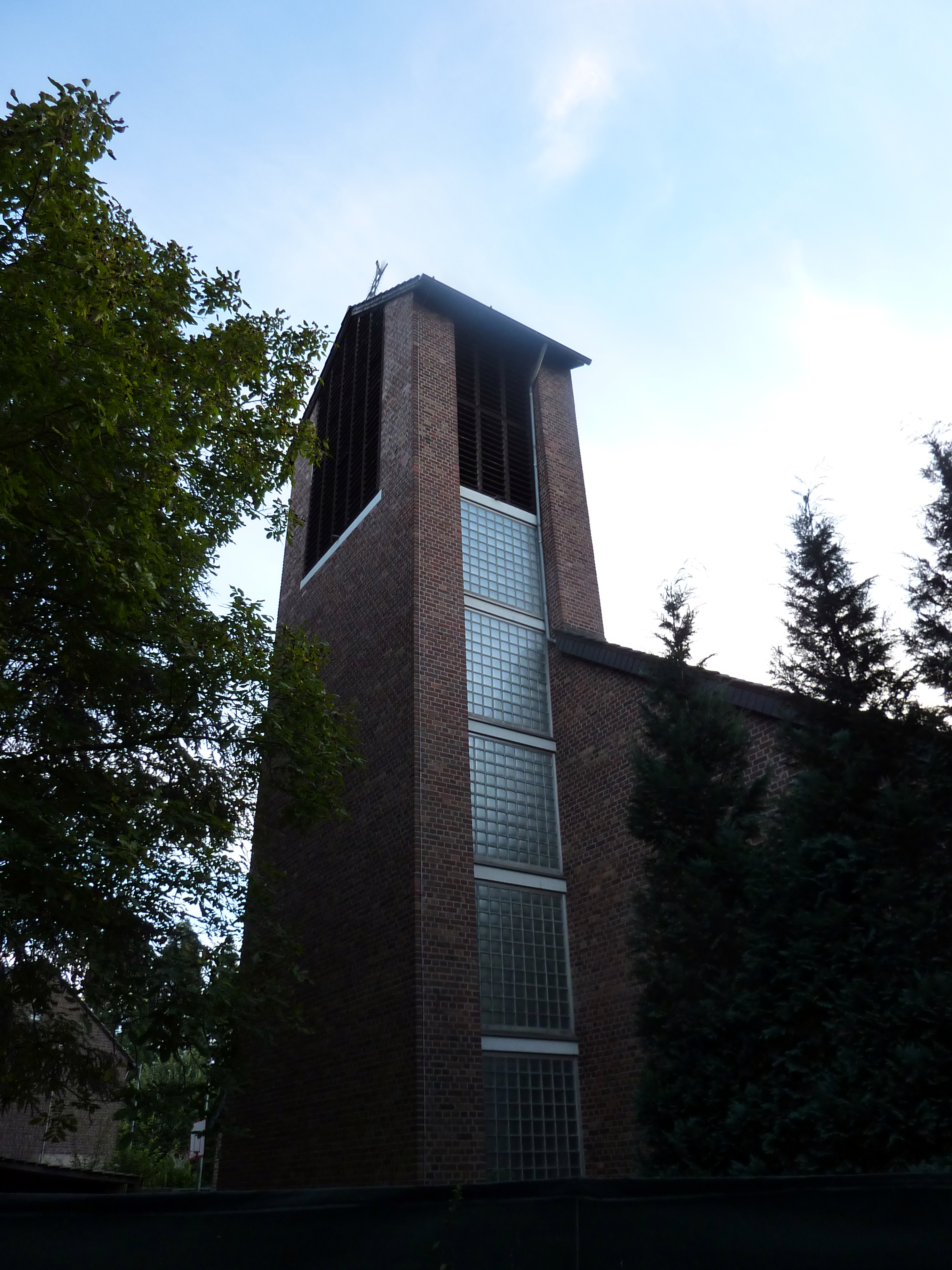 Kirche Heilig Geist u. Pfarrhaus, Frankenplatz 13–15This is a photograph of an architectural monument.